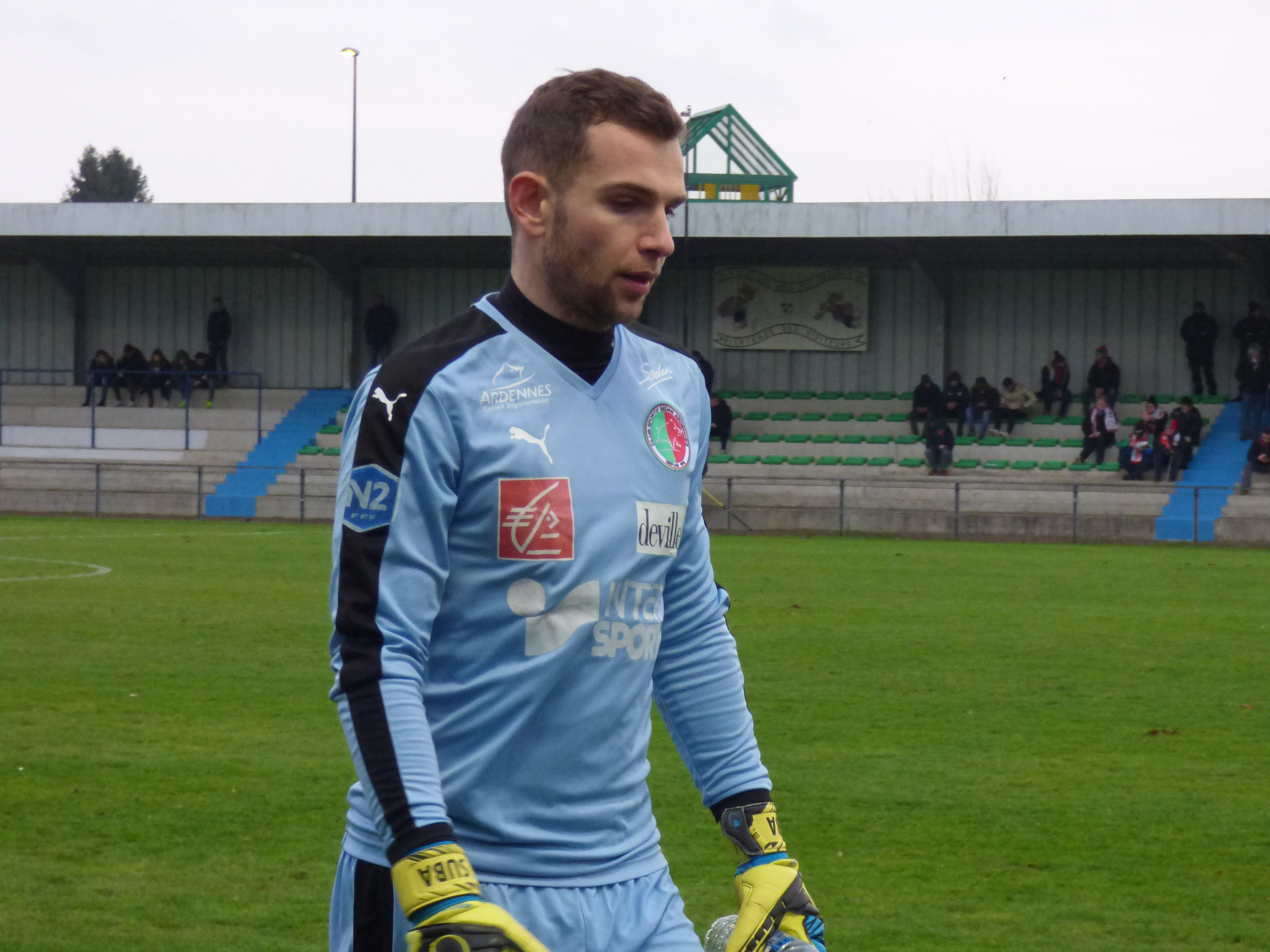 Axel Maraval lors du match Lens B / Sedan, comptant pour la quatorzième journée du Championnat de France de football de National 2 (4ème division française) 2017-2018 au Stade François-Blin d'Avion le 27 janvier 2018.